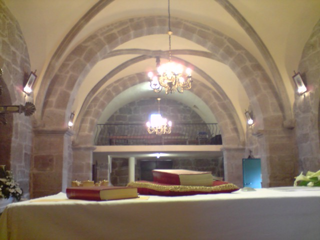 Interior Igrexa Bértola